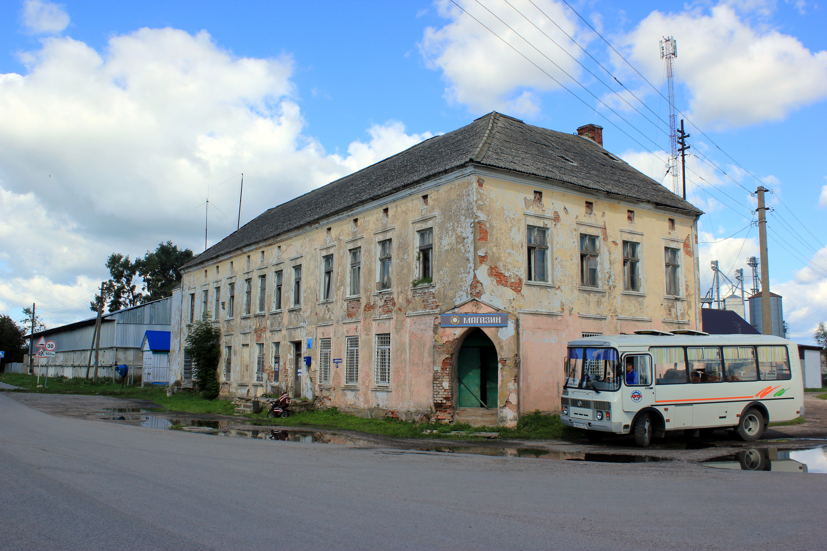 In Malomoschaiskoje (früher deutsch Budwethen), Oblast Kaliningrad, Russland.